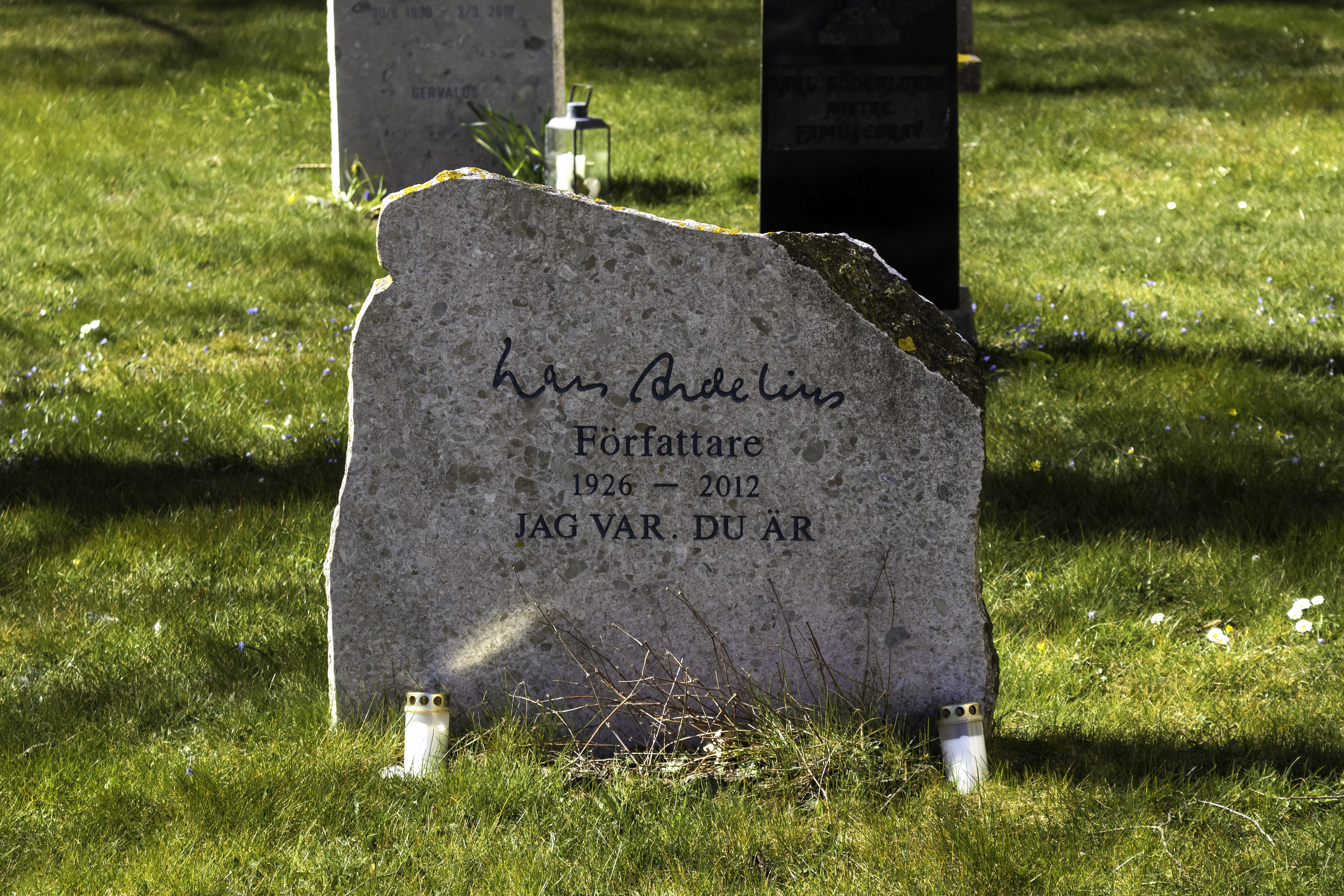 Tumba do escritor sueco Lars Ardelius no cemiterio de Vamlingbo, Gotland.